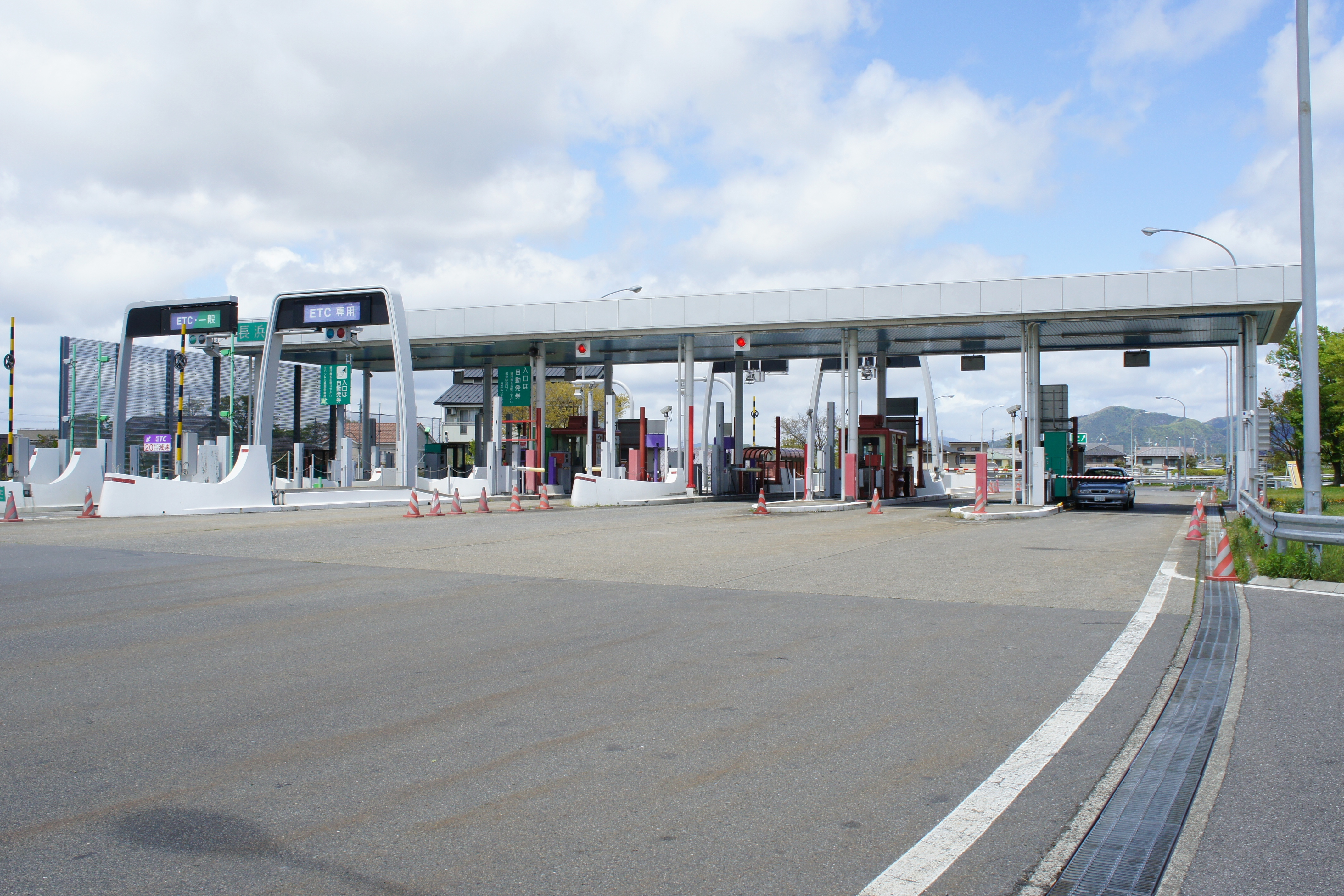 長浜インターチェンジ, 滋賀県長浜市